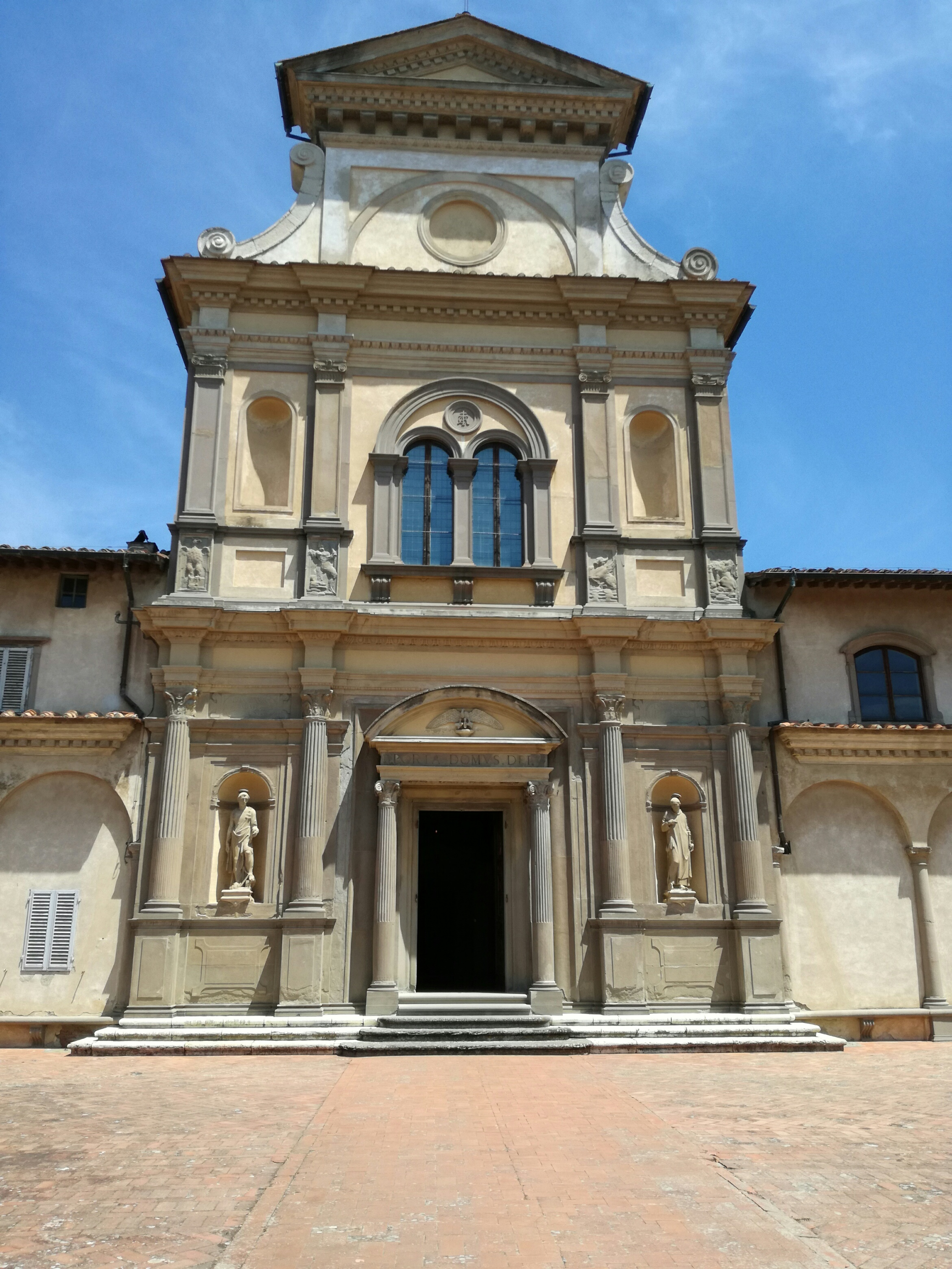 facciata chiesa san Lorenzo alla Certosa di firenze